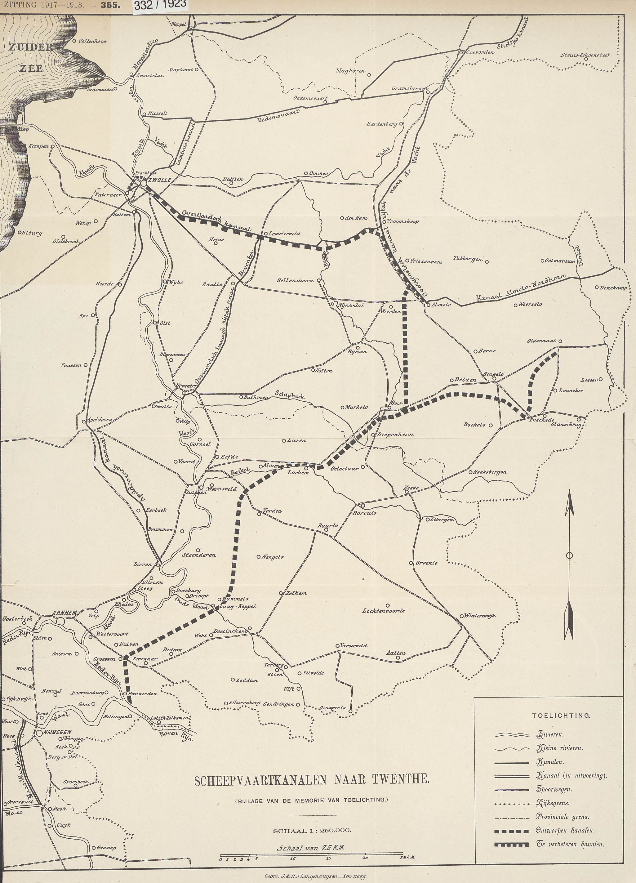 Op de kaart is een onderscheid gemaakt tussen bestaande kanalen, in uitvoering zijnde kanalen, ontworpen kanalen en te verbeteren kanalen. Door de toenemende textielnijverheid in Twente werd de noodzaak tot meer en betere verbindingen over water sterk gevoeld